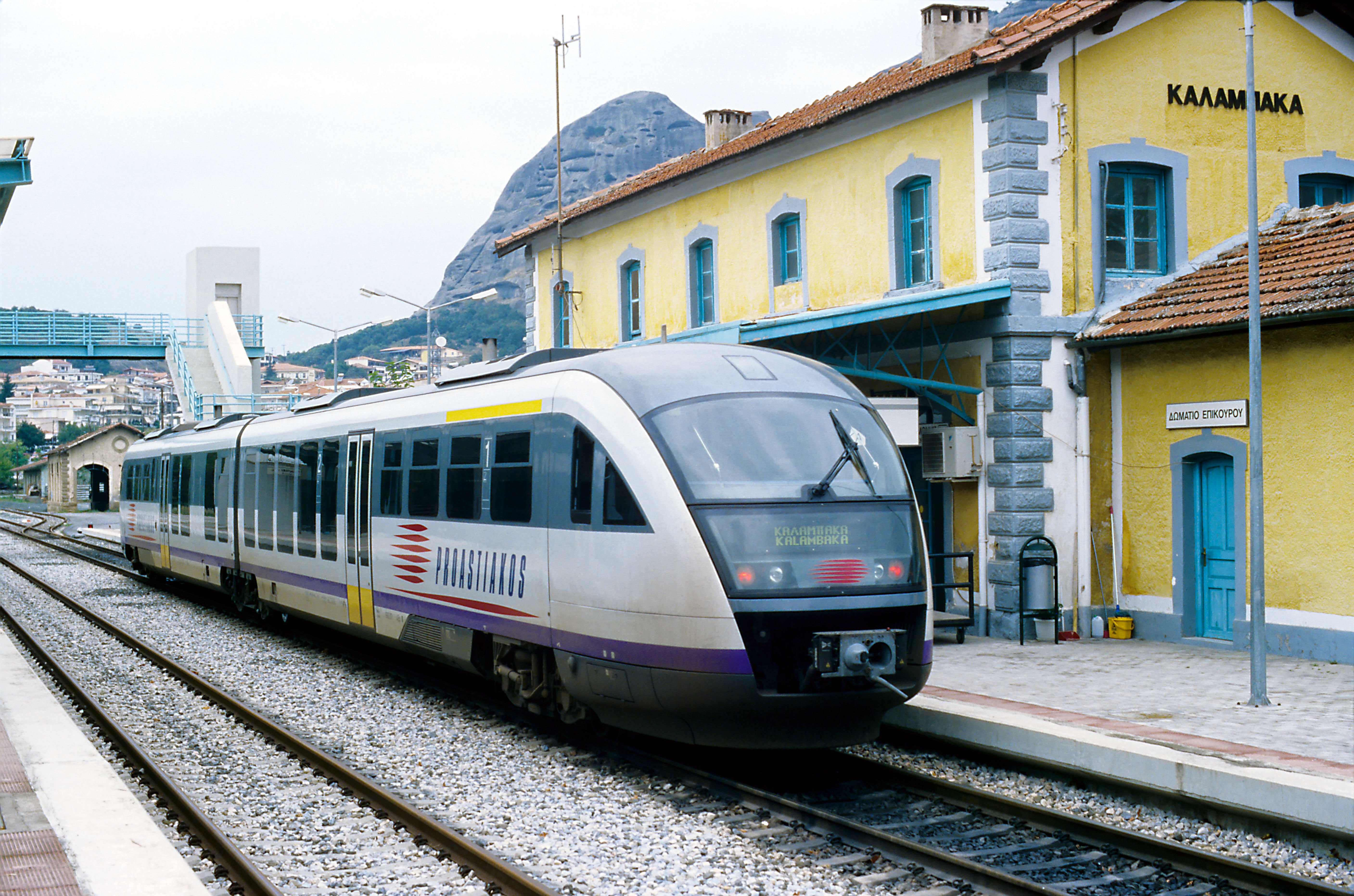 Einer der geliehenen und für Bulgarien bestimmten Desiro-VT im Bahnhof Kalambaka nach der Umspurung. Die Lage größeren Bahnhöfe der Strecke Paläofarsalos–Kalambaka sowie die der letzten Kilometer vor Kalambaka hat sich beim Umspuren nicht wesentlich verändert.